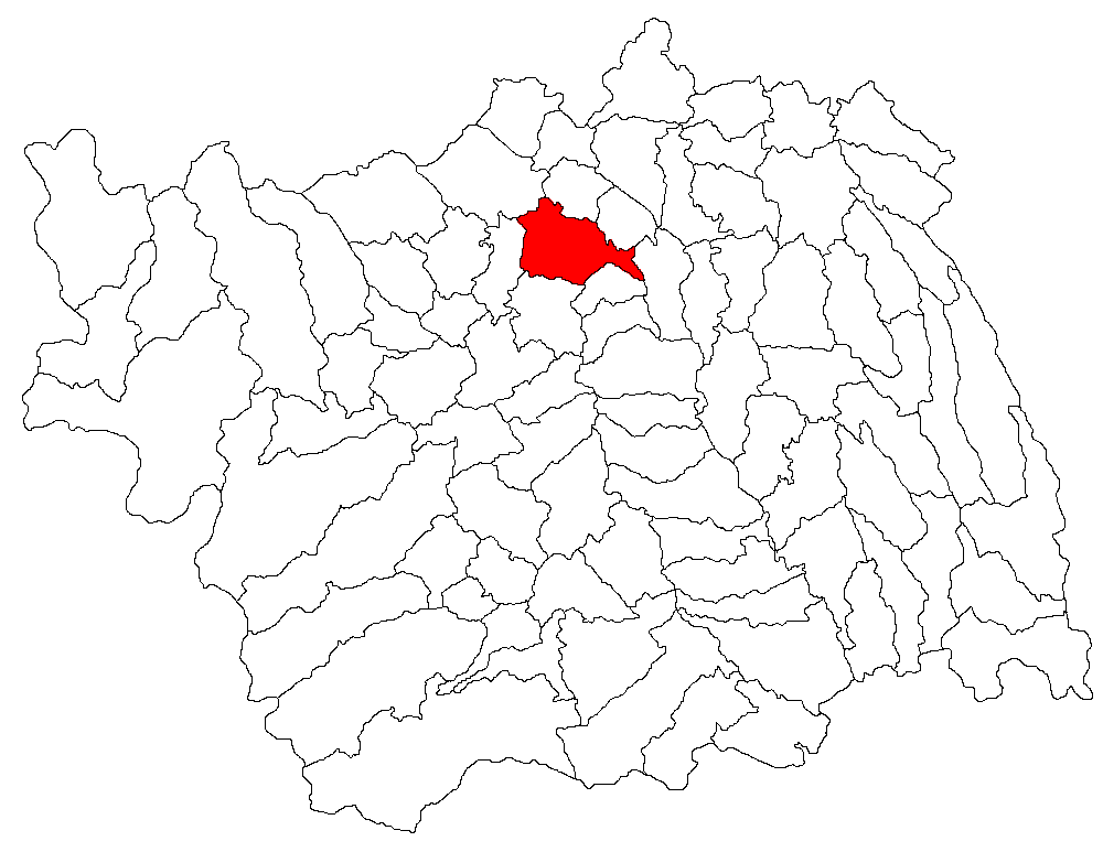 Categorie:Hărţi ale judeţului Bacău